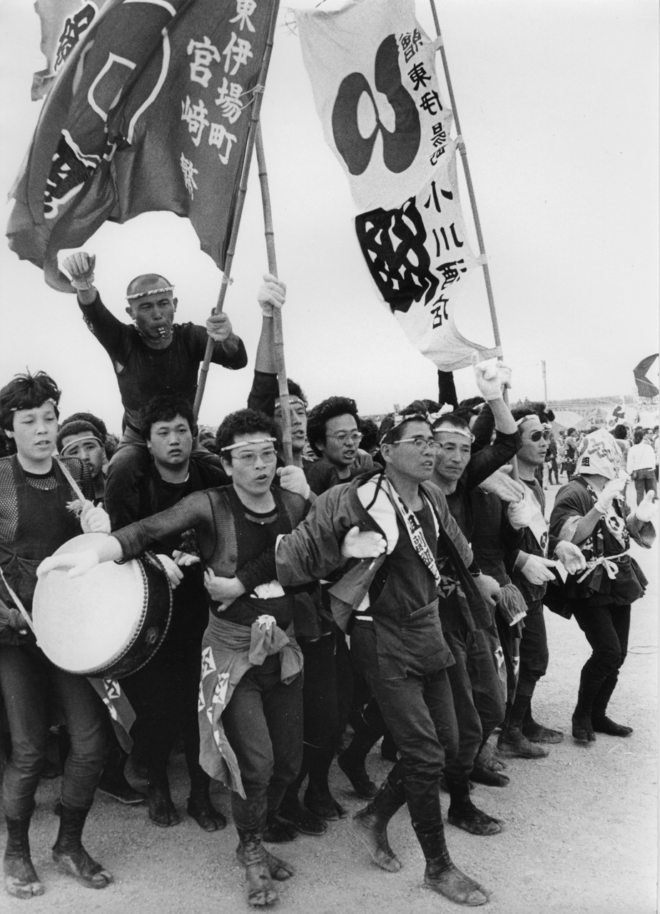 japonská slavnost Tako macuri v Hamamatsu, 1981